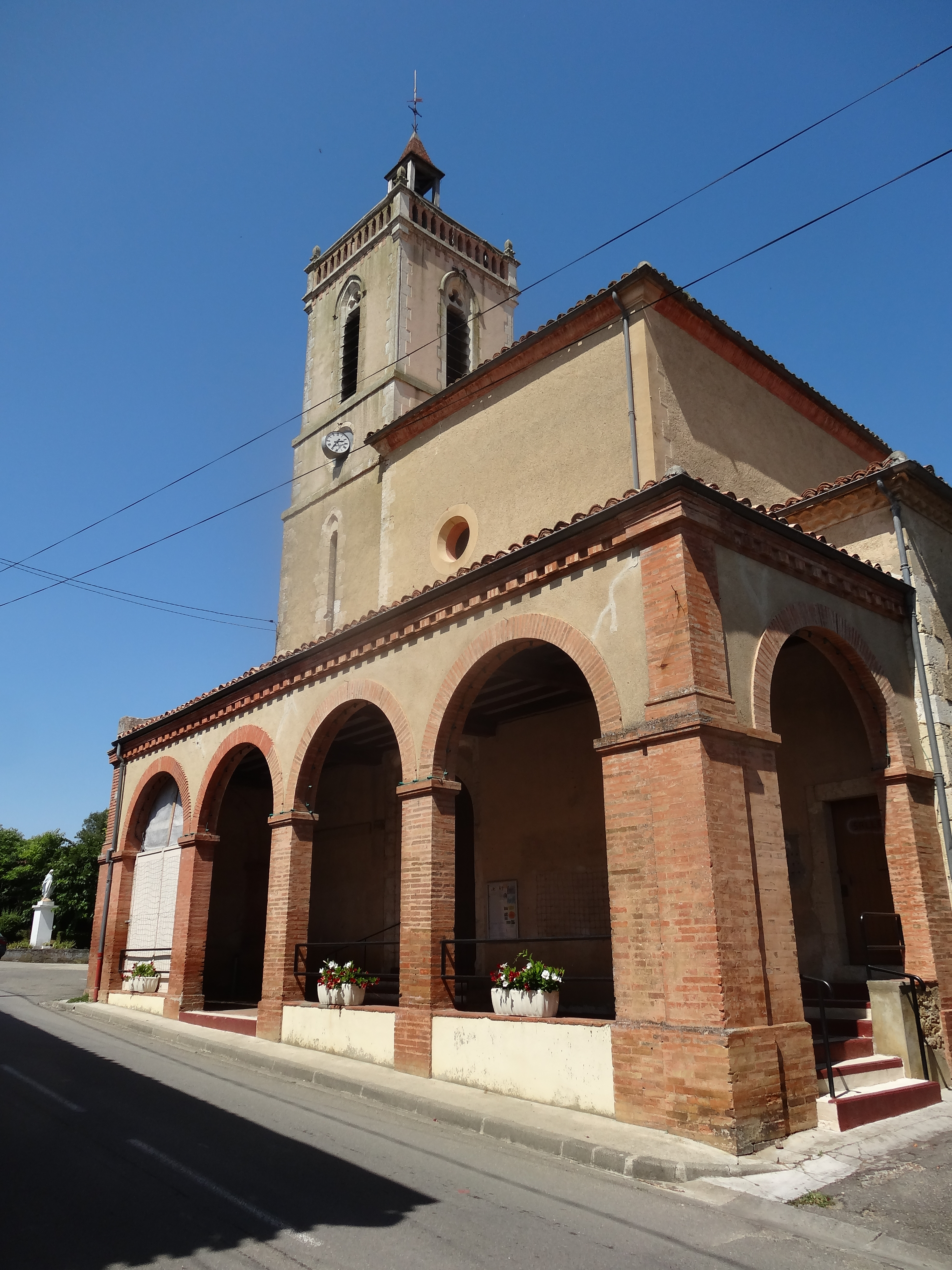 L'église avec son porche à Saint-Sauvy.